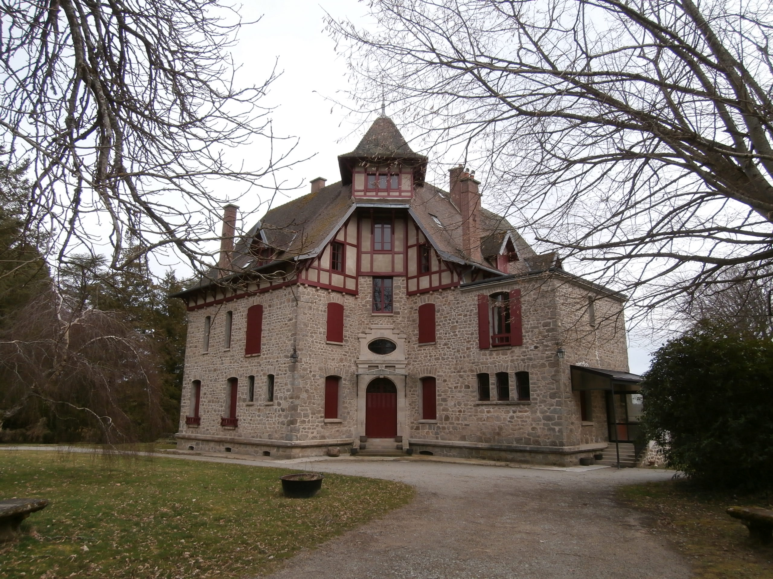 Villa de style normand